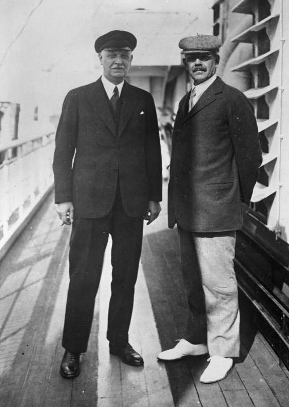 Deutschlands bedeutendste Witschaftsführer fahren nach Amerika ! Deutschlands bedeutendste Witschaftsführer Geheimrat Dr. Wilhelm Cuno, Präsident der Hamburg-Amerika-Linie, (links) und Dr. Karl-Friedrich von Siemens, der Präsident der Siemens-Conzerne (rechts) an Bord des Hapag-Schnelldampfers "New York" auf dem Wege nach Amerika.